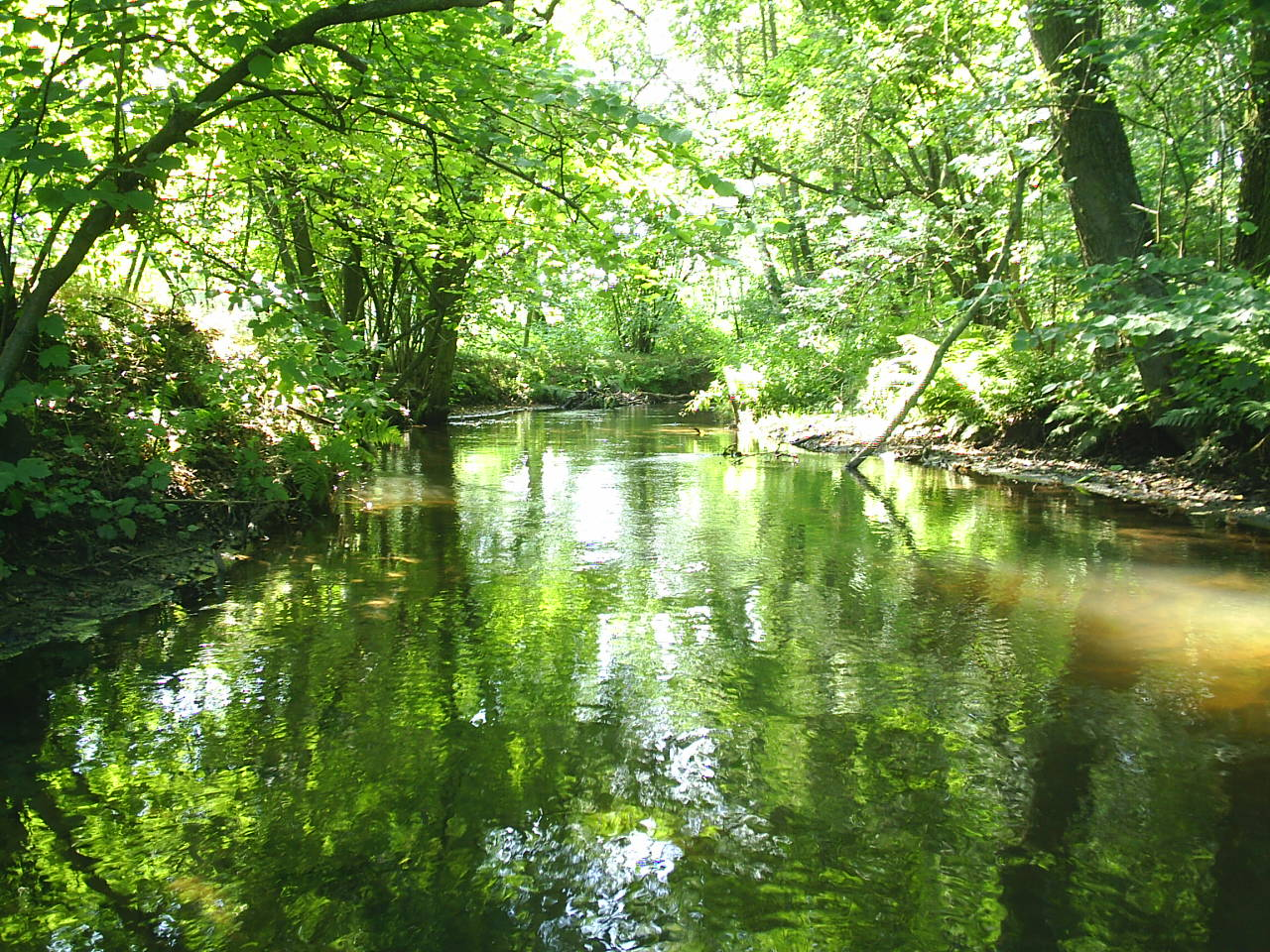 Plane bei Belzig (Deutschland, Germany)